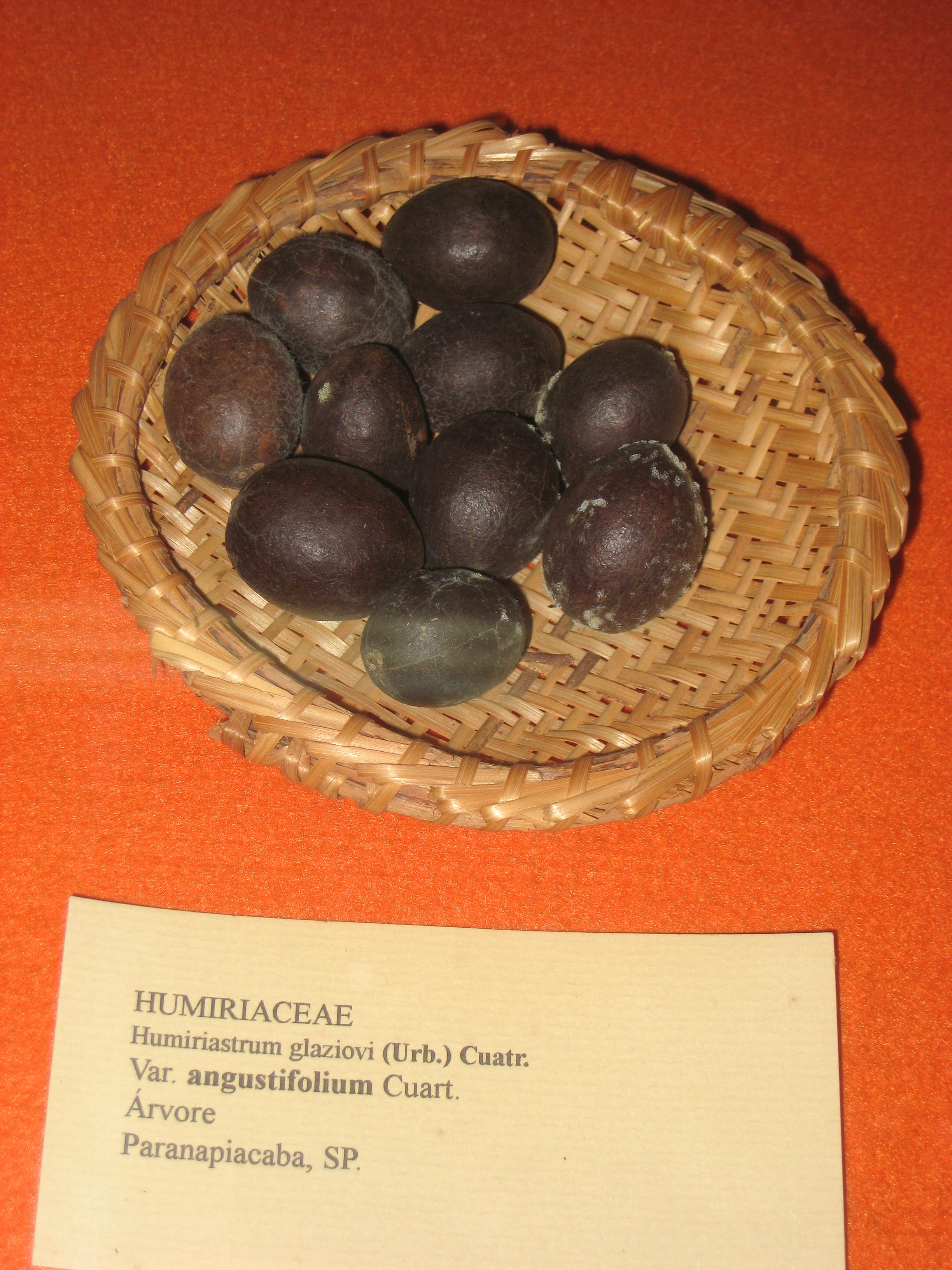 Humiriastrum glaziovii specimen in the Museu Botânico Dr. João Barbosa Rodrigues, Jardim Botânico de São Paulo, São Paulo City, SP, Brazil.